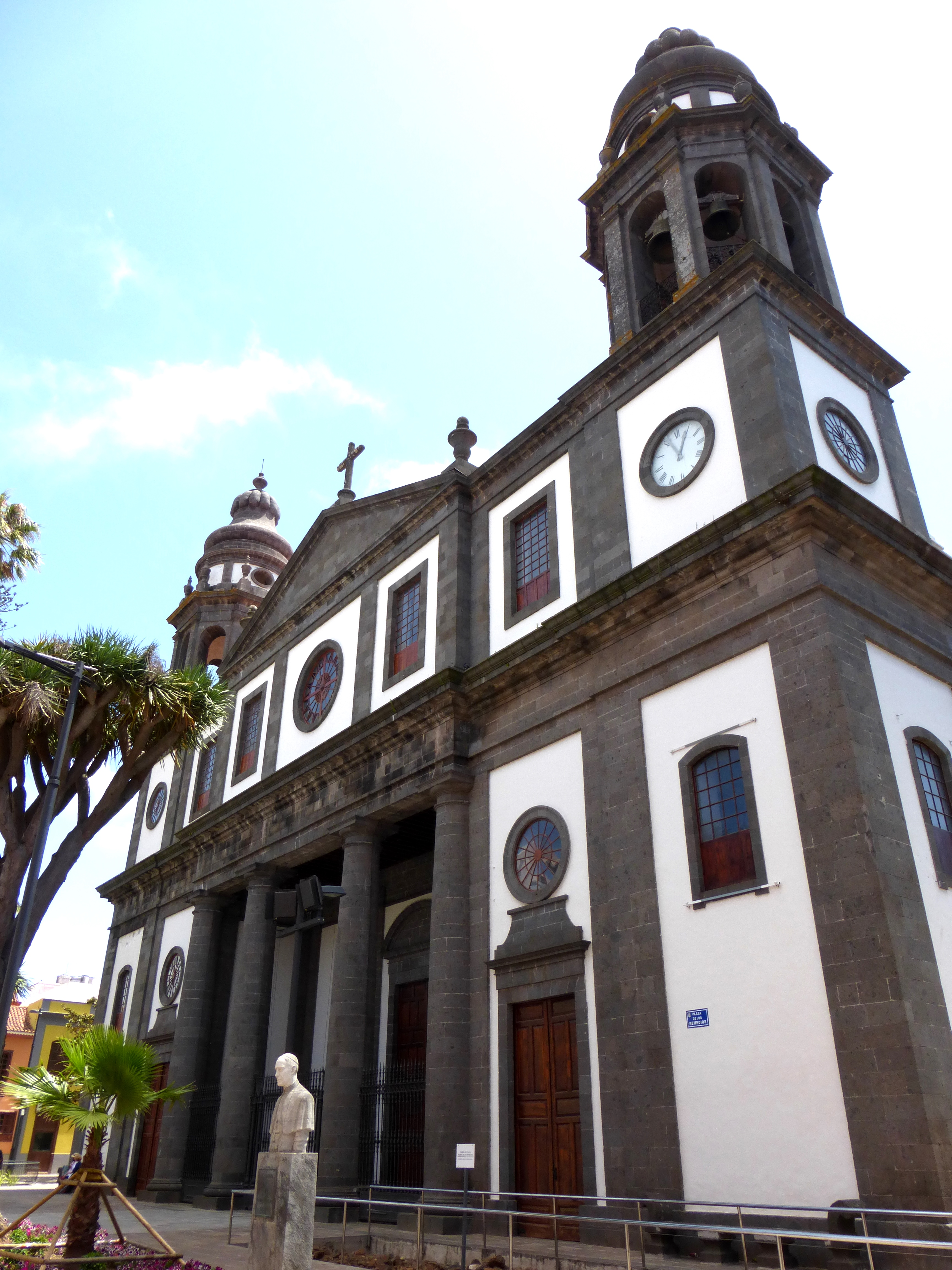 Facciata della cattedrale di San Cristobal de La Laguna, Tenerife.